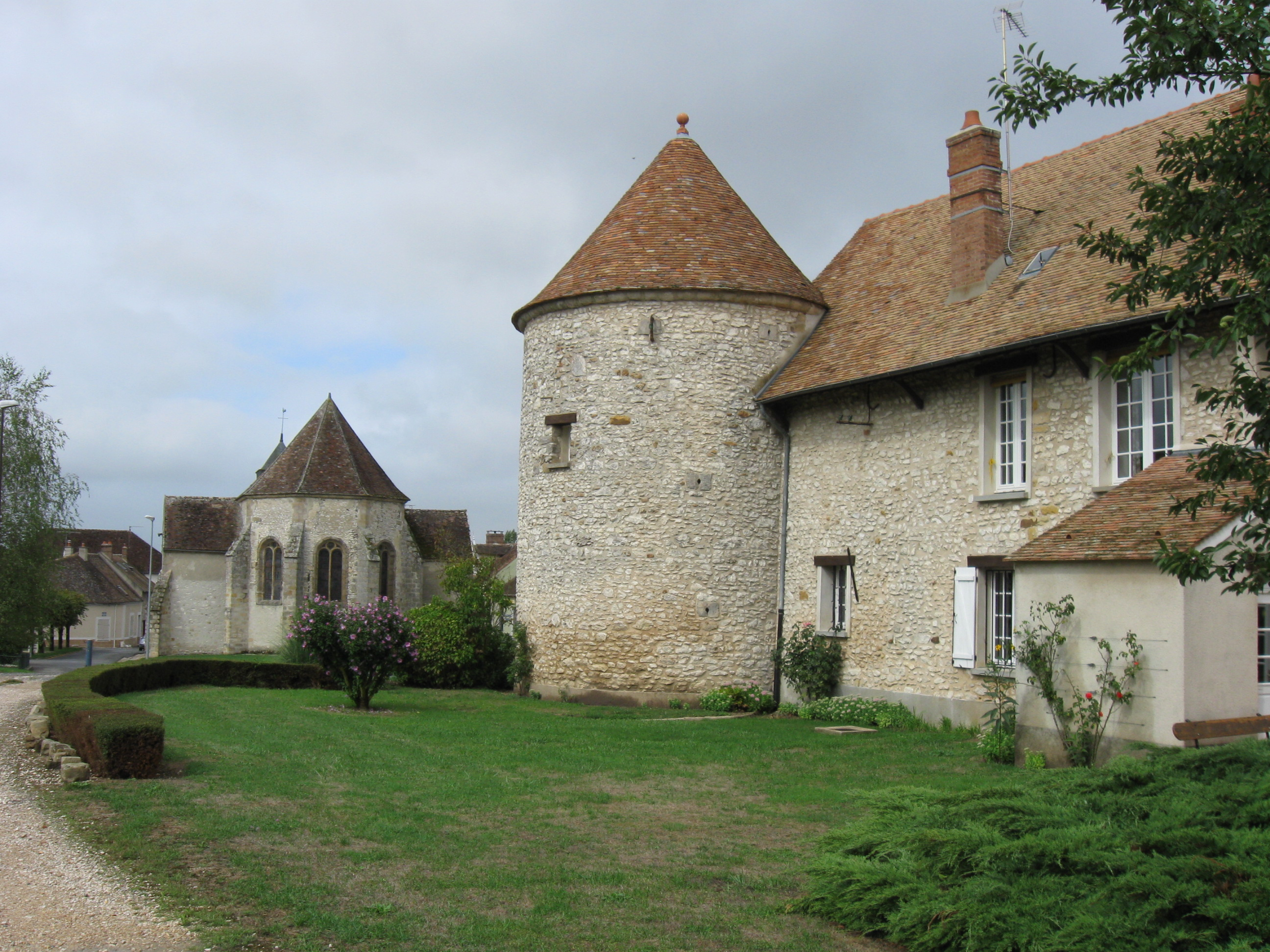 La ferme du château et l'église Saint-Nicolas de Valence-en-Brie. (Seine-et-Marne, région Île-de-France).